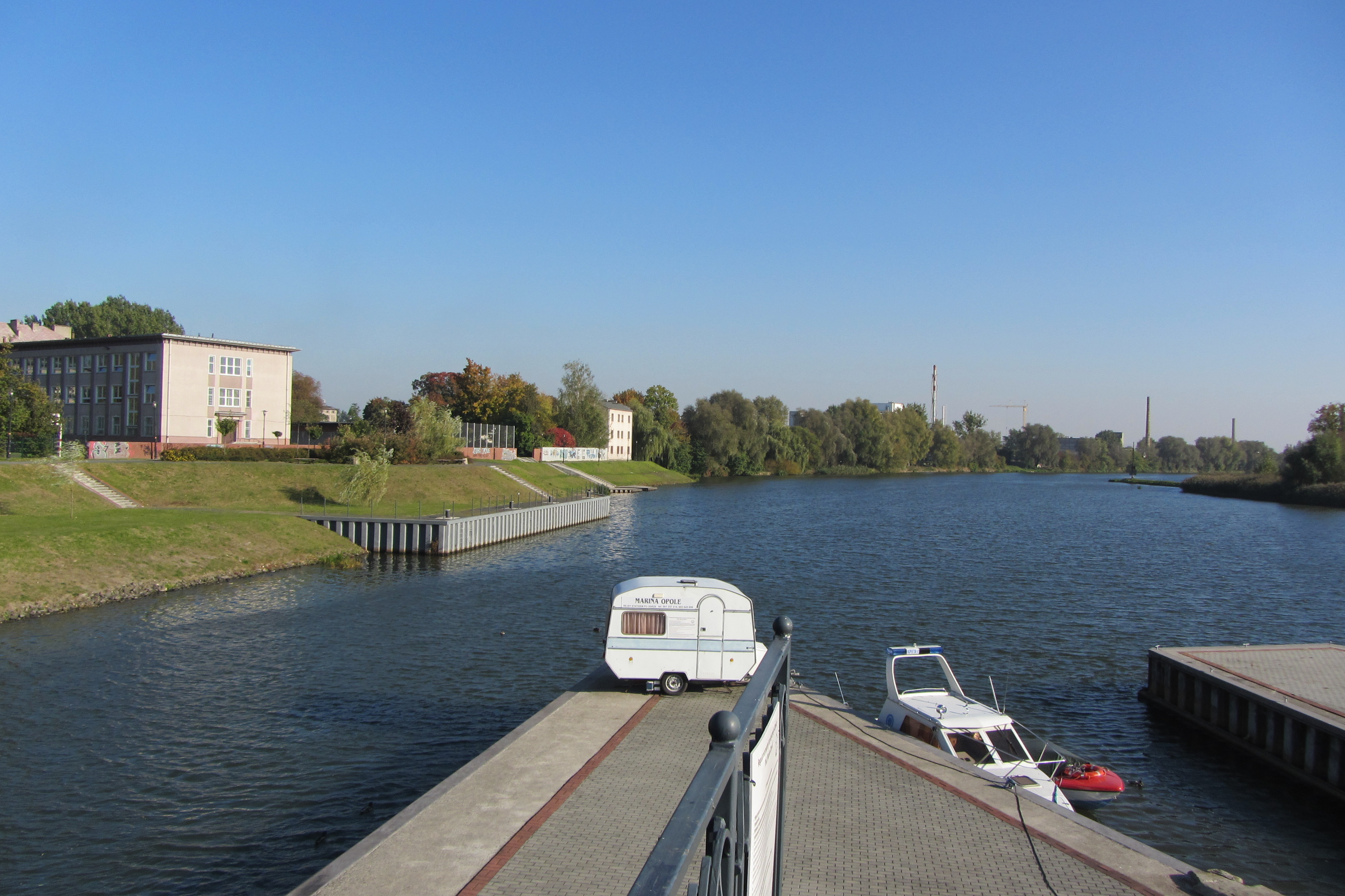 Abzweigung des Nebenarms der Order, dem Mühlgraben.